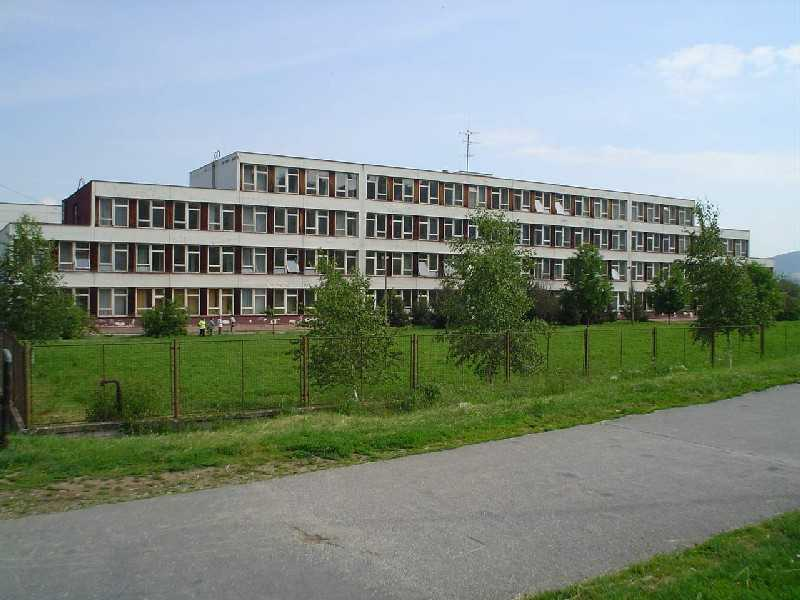 Budova základnej školy Malinovského v Partizánskom